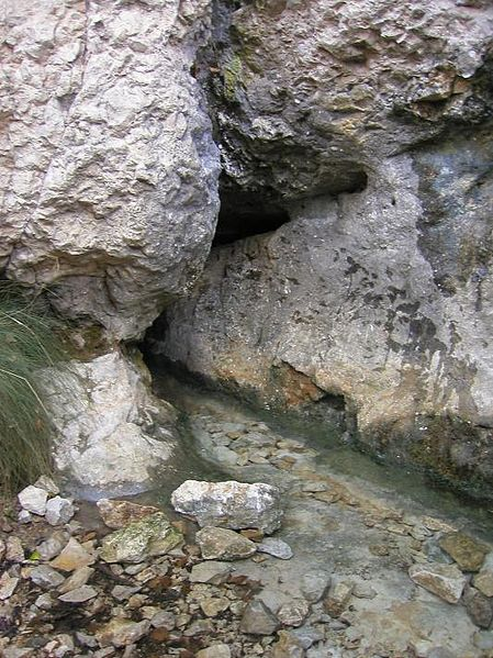 Source de la rivière Le Boulon, à Robion, Vaucluse